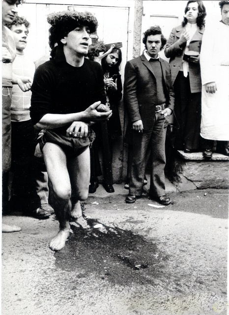 A Nocera Terinese, la mattina del Sabato Santo, un gruppo ligneo che rappresenta la Pietà viene portato in processione per tutto il paese fino a raggiungere il Calvario una collinetta nella parte alta del paese. A margine della processione si svolge il rito dei vattienti. Alcuni uomini sull'uscio di casa mettono a bollire acqua con rosmarino ed altre erbe, poi si percuotono la parte posteriore delle gambe dapprima con le mani bagnate nell'acqua bollente, poi con il cardo, un pezo di sughero con tredici pezzetti di vetro tagliente, fino a far fuoriuscire abbondante sangue. A questo punto corrono per il paese e ripetono il rito davanti alle chiese ed alle case di amici e parenti.